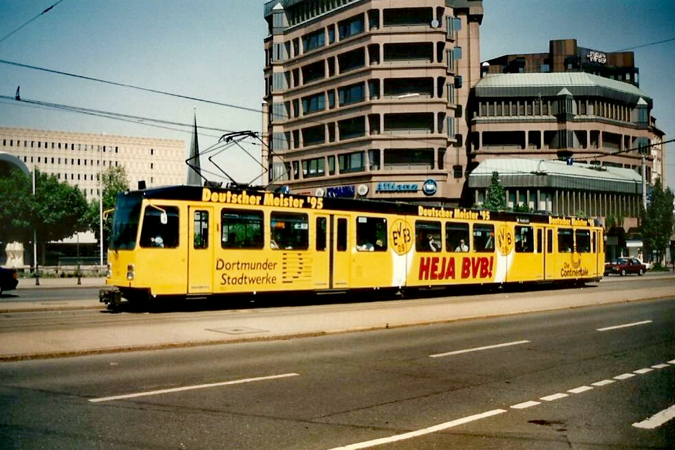 Straßenbahn im Juli 1995 an der Haltestelle Stadttheater.